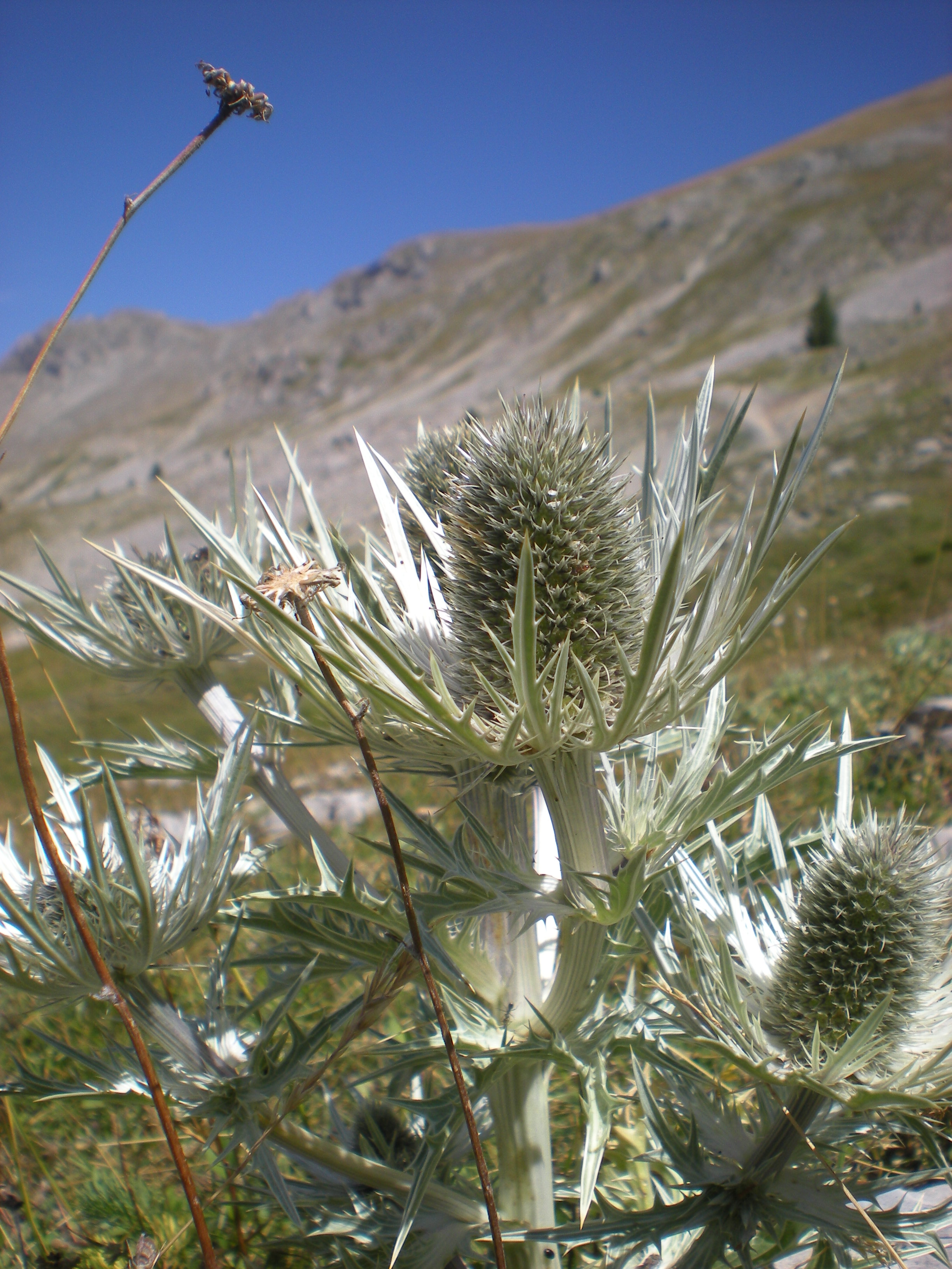 Capitule